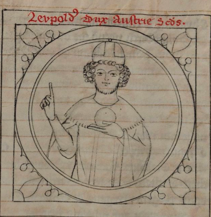 Leopold V, Duke of Austria